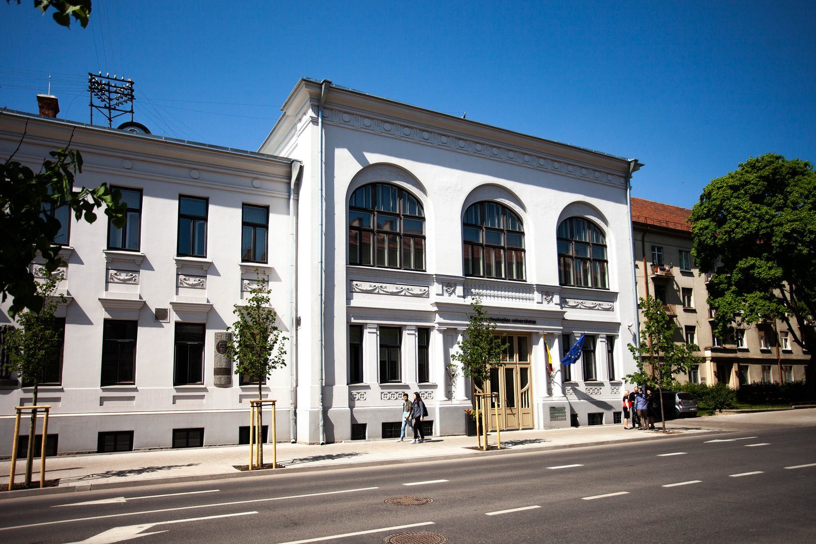 KTU aula, 2018 m.